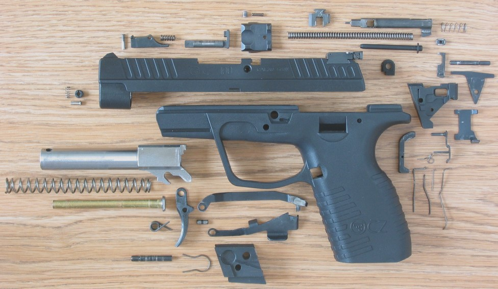 CZ 100